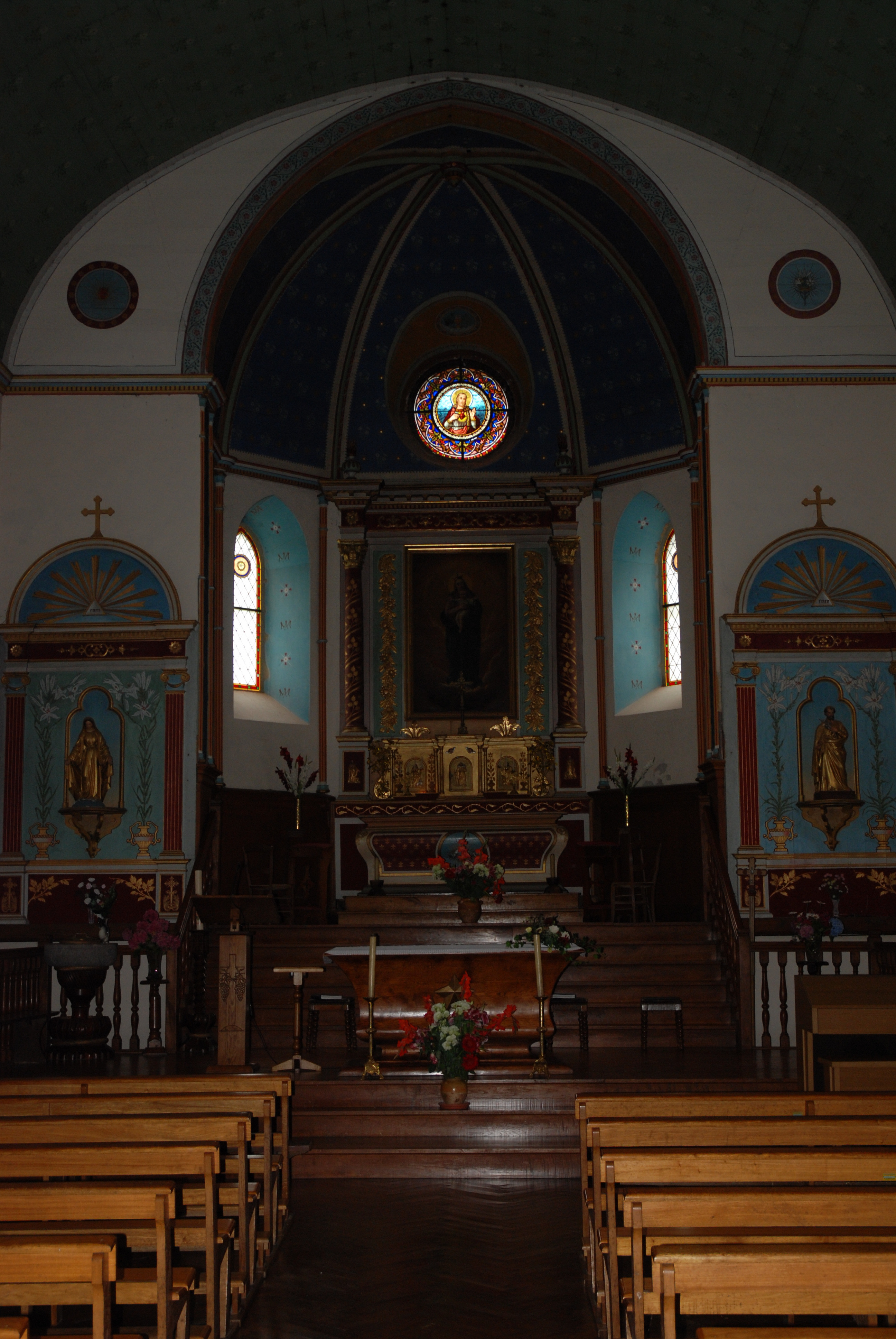 Estérençuby, intérieur de l'église Notre-Dame